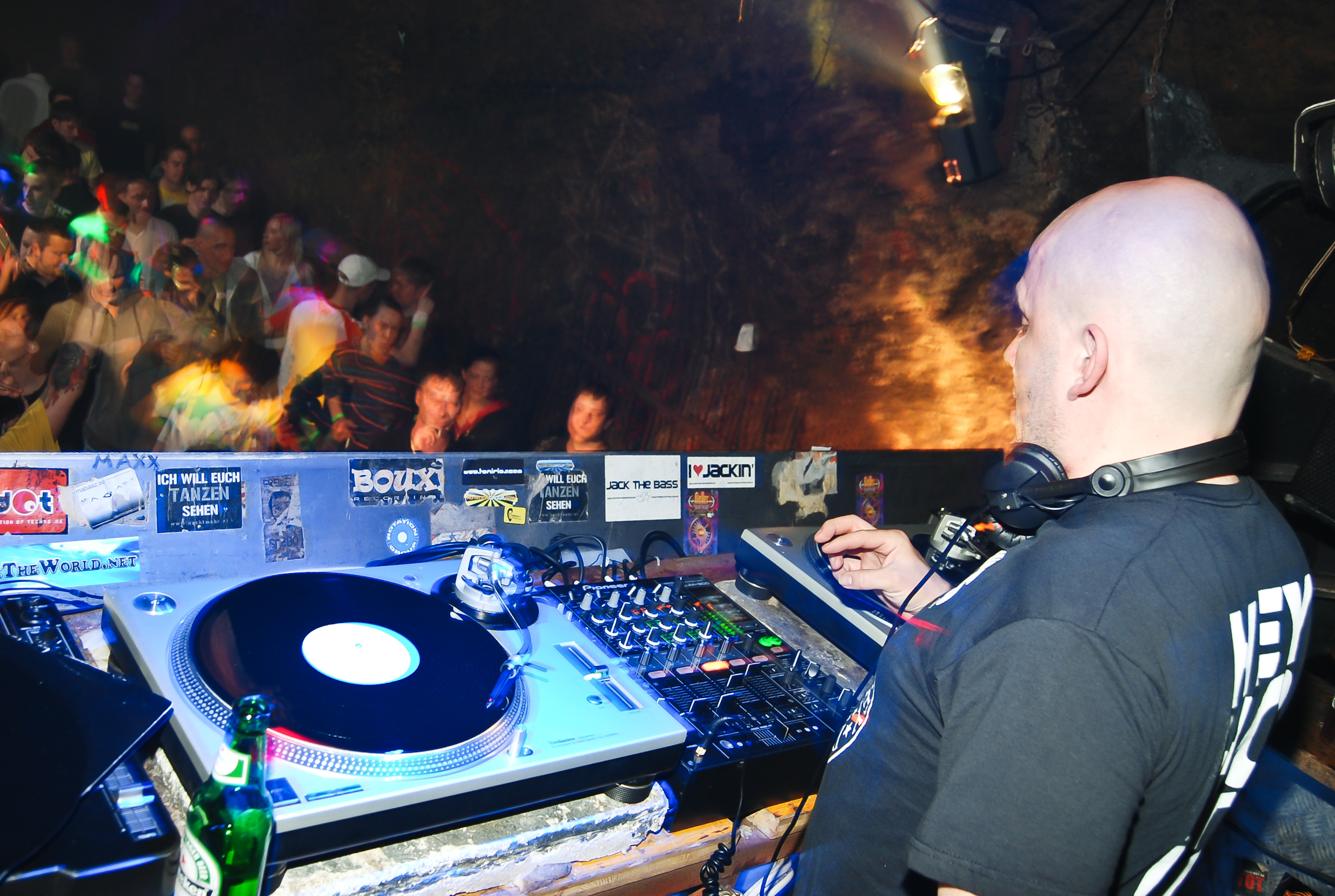 Westbam im Cave Club Salzburg